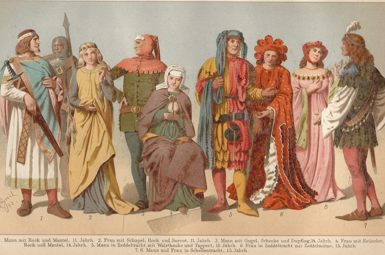 Kleidung („Kostüme“) des Mittelalters